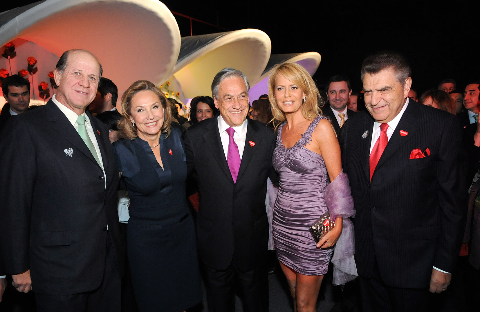 El Presidente de la República asistió esta noche a la cena de lanzamiento de la Teletón 2010: Chile, un solo corazón.